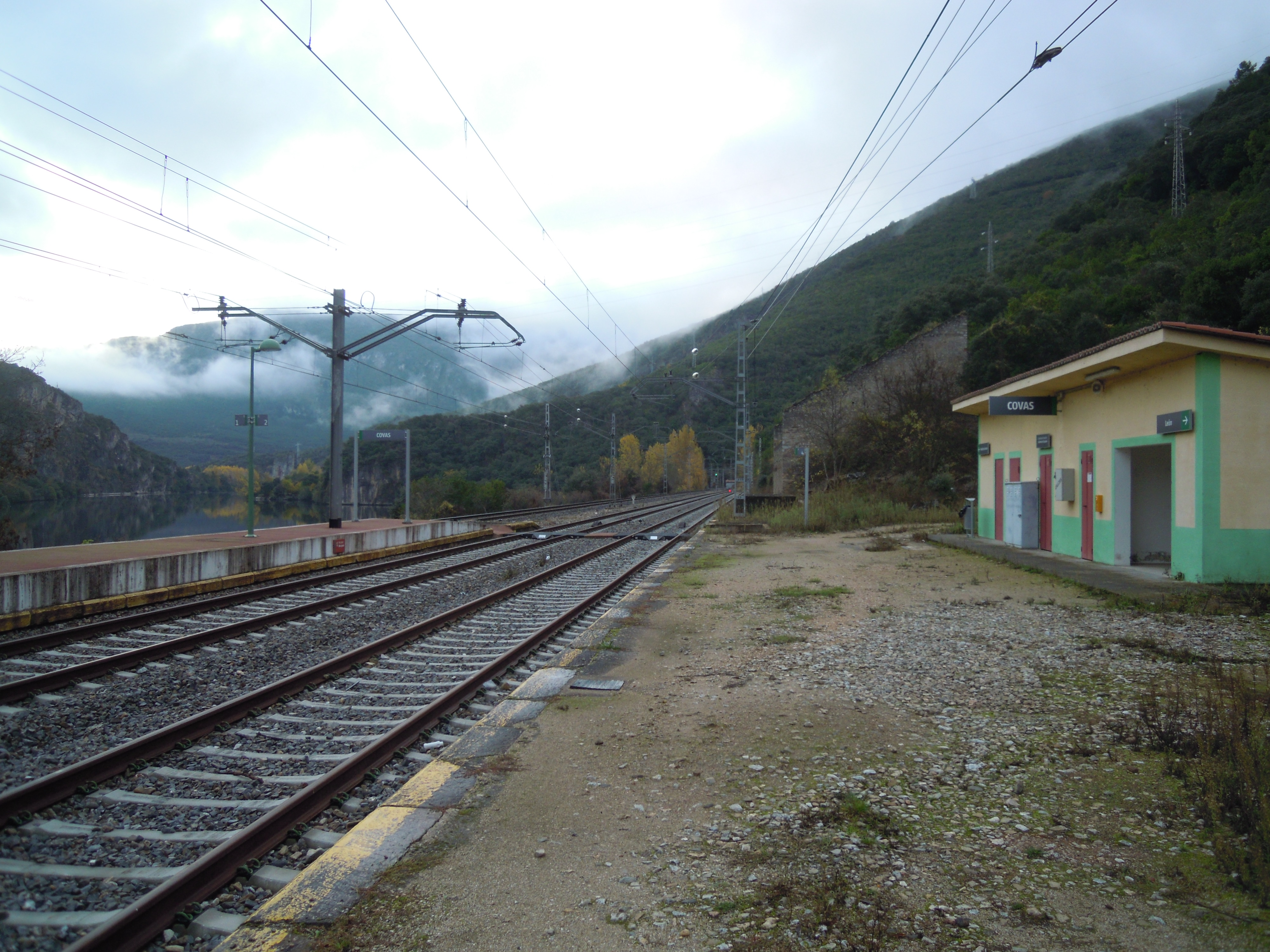 Estación de Covas, en Covas (Rubiá), a pé do encoro de Penarrubia, no río Sil.